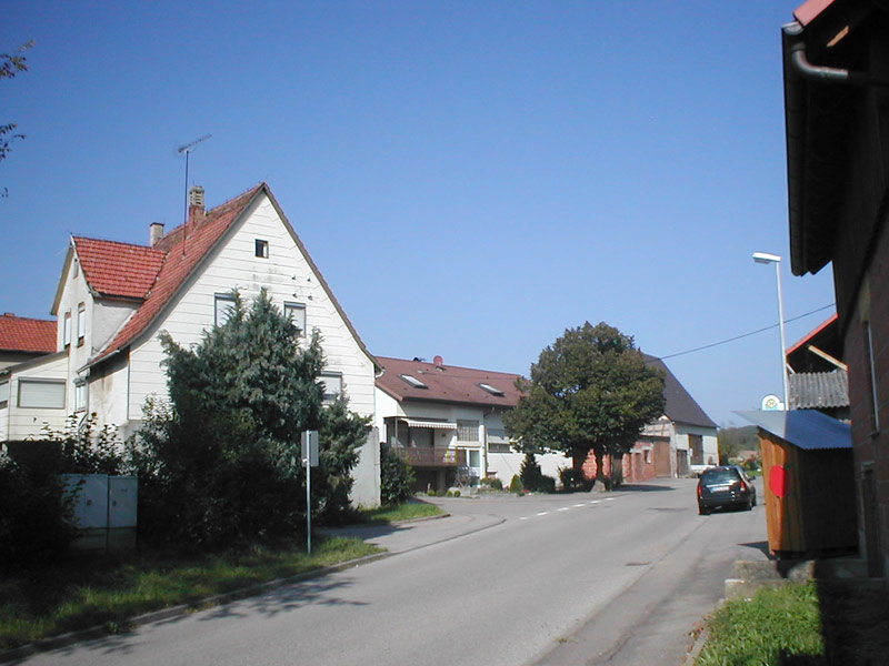 Der aus sechs Bauernhöfen bestehende Weiler Söhlbach von Beilstein (Baden-Württemberg), Deutschland